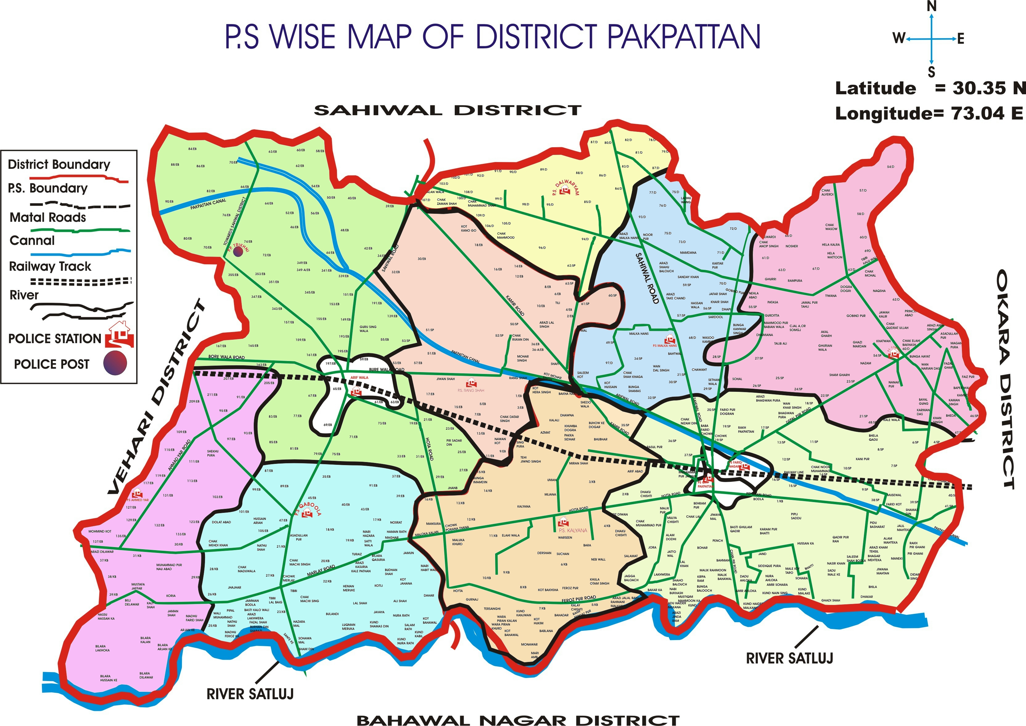 پنجابی: ضلع پاکپتن دے پنڈاں دا نقشہ